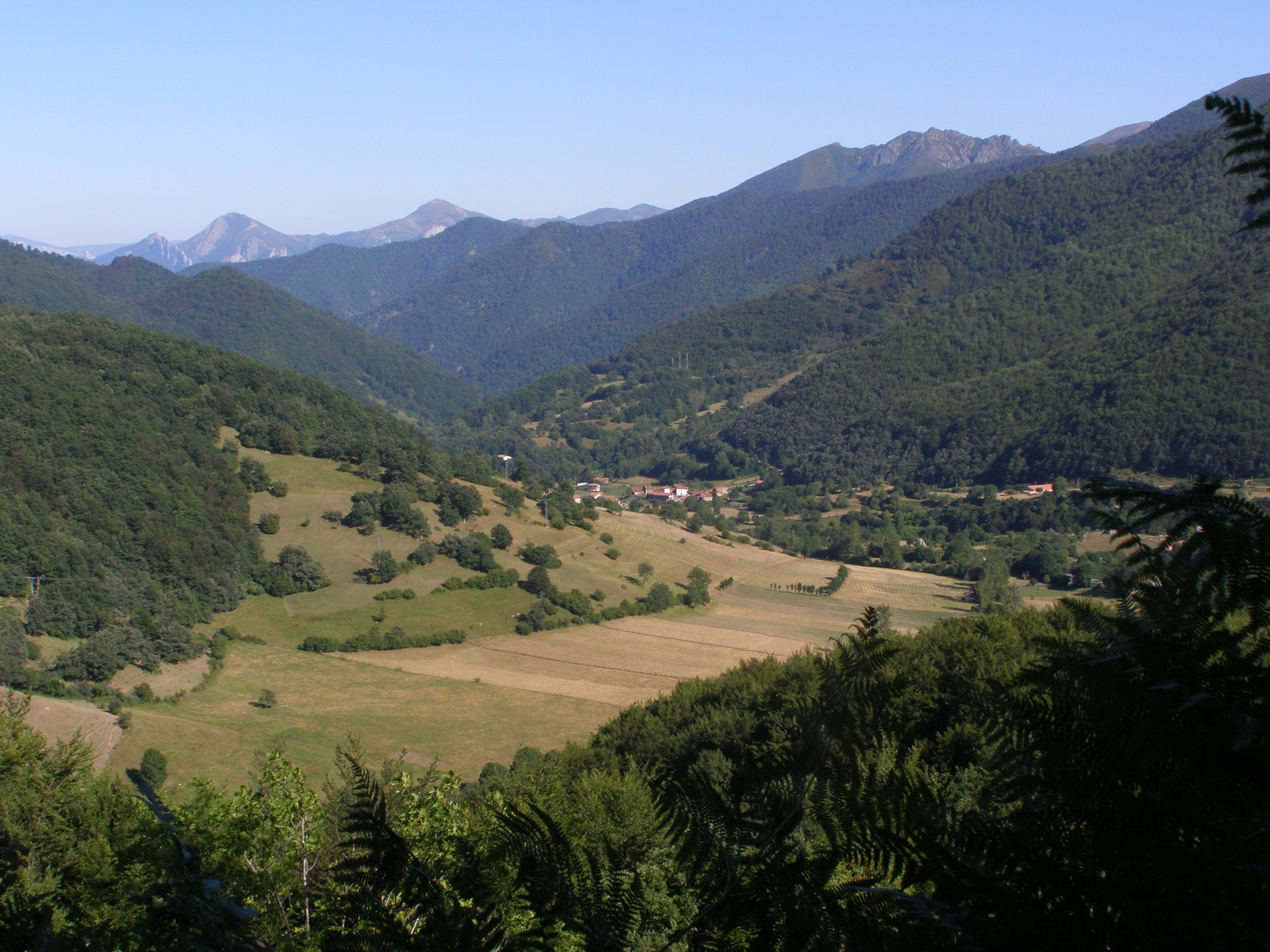 Foto van het dorp Pido in Spanje.